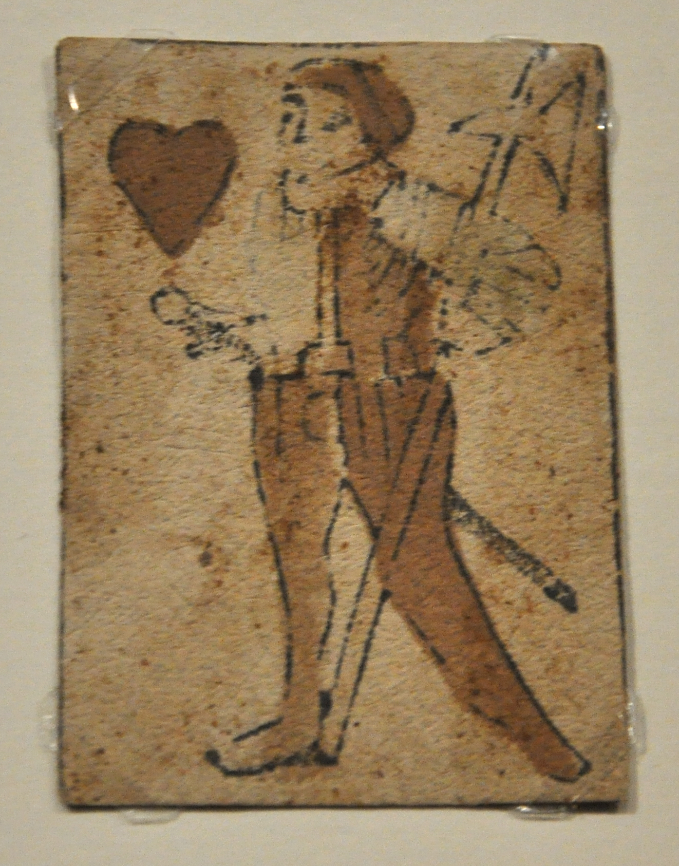 Bregenz, Vorarlberg Museum, Spielkarte Vorarlberg museum Native namevorarlberg museumLocationBregenz, Vorarlberg, AustriaCoordinates47° 30′ 15.84″ N, 9° 44′ 48.01″ E Established1857Web pageVorarlberg Museum websiteAuthority control : Q2533480 VIAF: 124303291 ISNI: 0000 0001 2242 622X LCCN: n50051186 GND: 18871-2 SUDOC: 030717523 WorldCat institution QS:P195,Q2533480